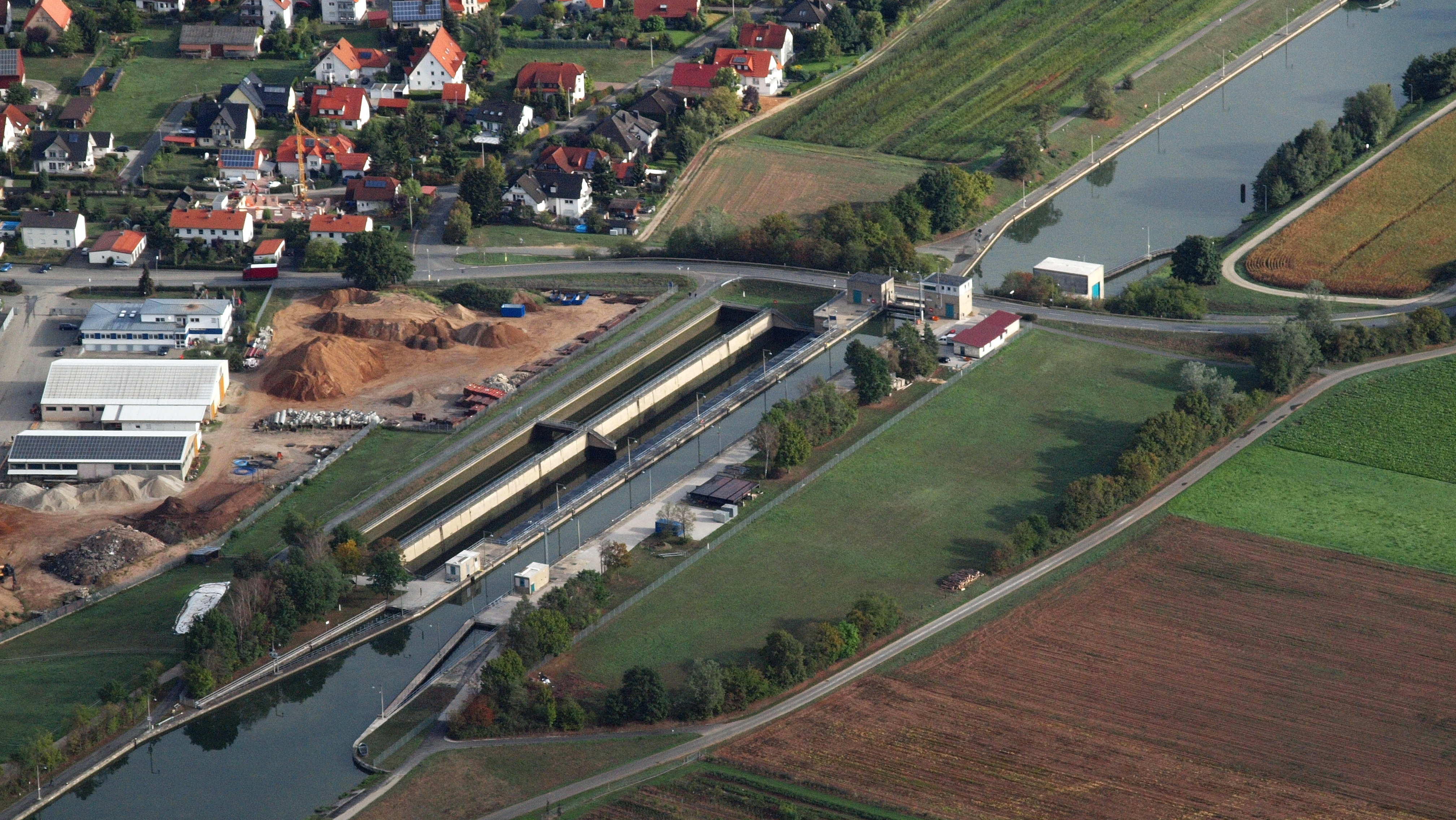 Schleuse Hausen, Luftaufnahme (2015)